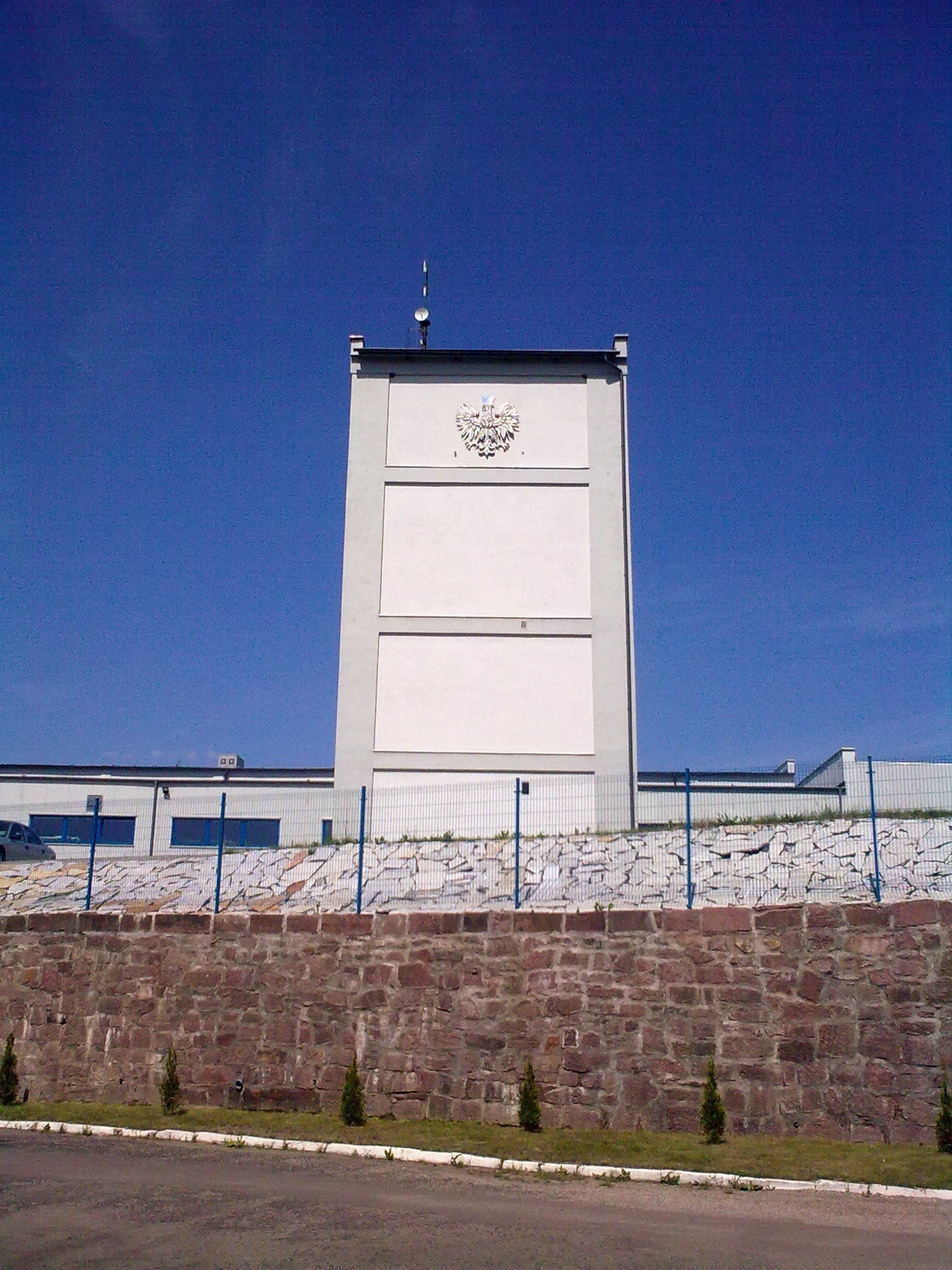 Nowa Ruda Drogosław, ul. Obozowa 4 - wieża szybu "Anna" (Pole "Piast"), 1898